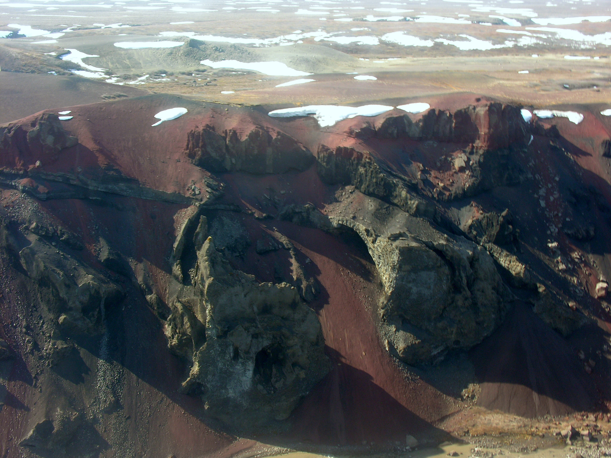 Aerial View of Jökulsá á Fjöllum